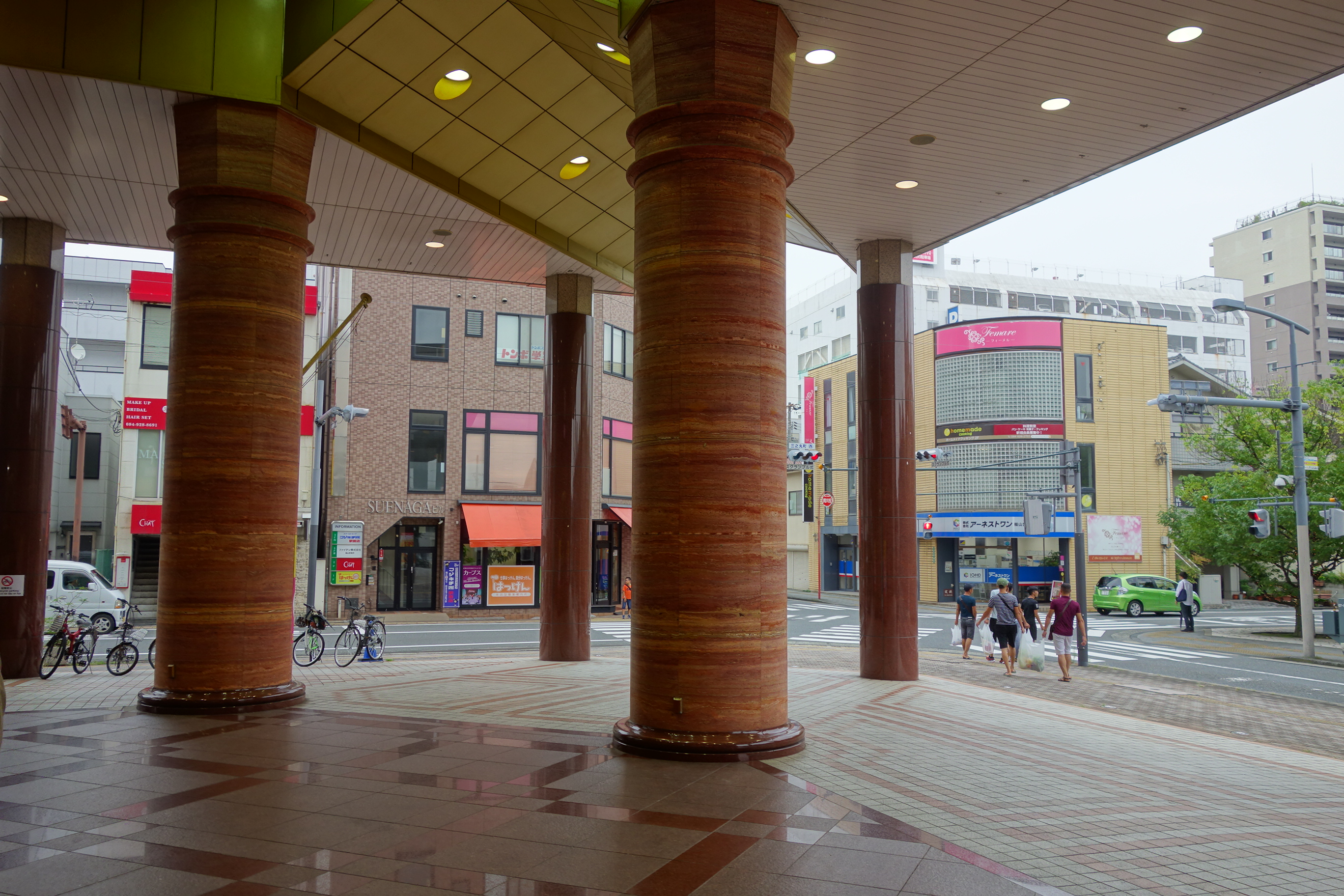 広島県福山市のRiM-fの玄関。旧福山そごう時代の豪華な大理石の柱。「そごう」の特徴である仕掛け時計などは撤去されている。